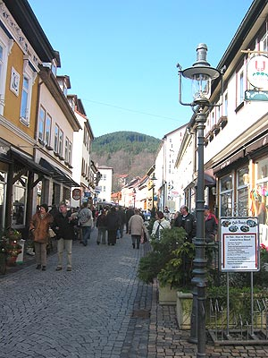 Friedrichroda, Hauptstrasse (Original text: Friedrichroda, Hauptstrasse)